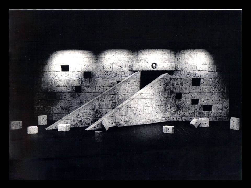 שירה של עגנון